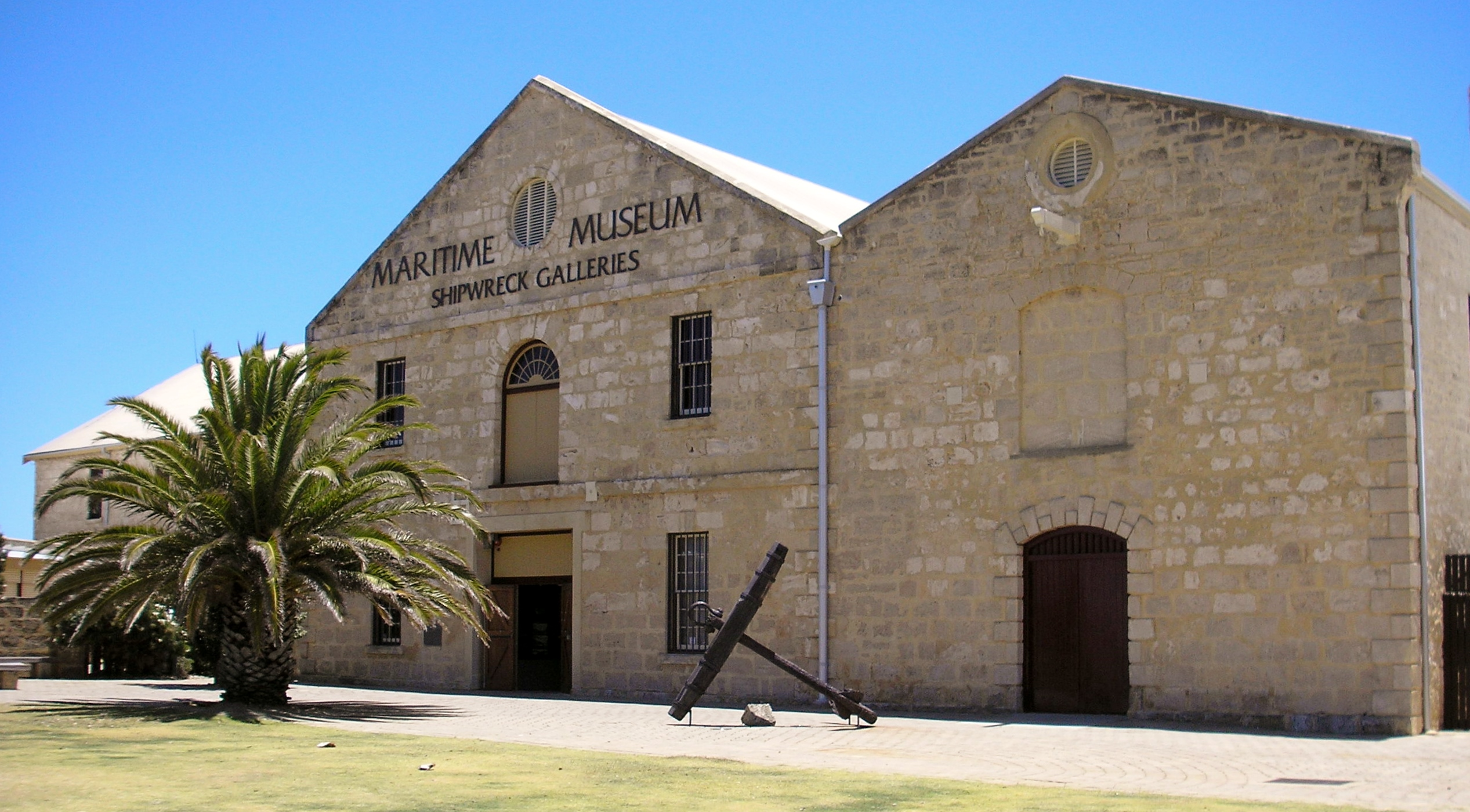 Western Australian Maritime Museum, Fremantle, Western Australia.